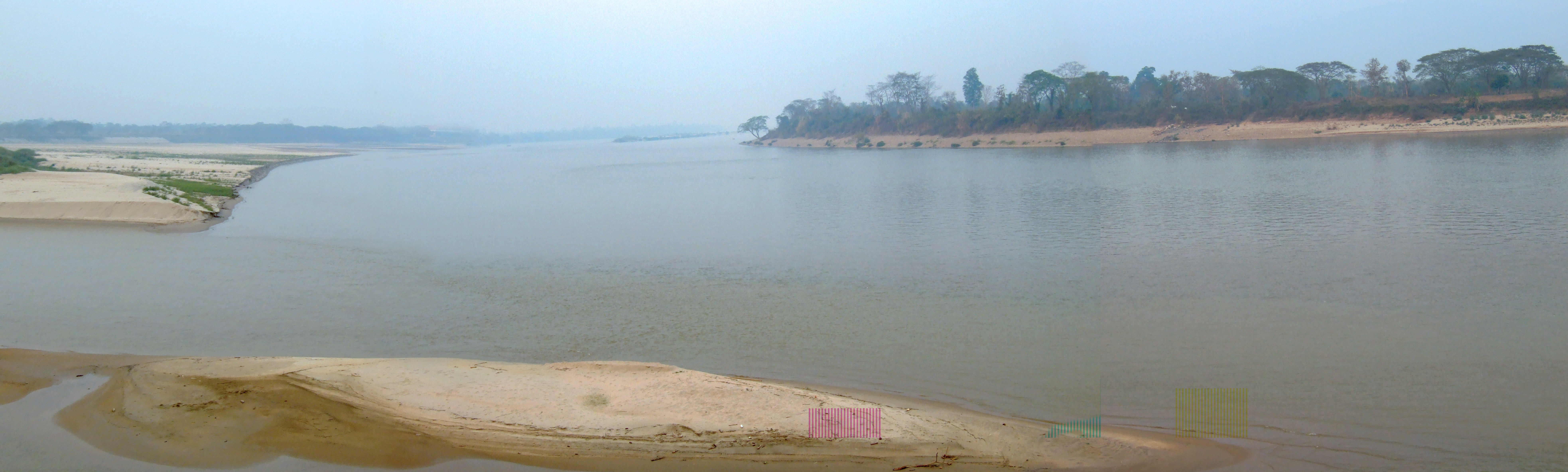 Panoramaนี้เป็นภาพแสดงอาณาเขตติดต่อระหว่างประเทศไทย - ลาว - พม่า หรือเรียกอีกชื่อว่า สามเหลี่ยมทองคำ ภาพนี้ถ่ายโดย User:LazarusSP1 โดยใช้กล้อง ของ User:Thanyakij โดยทำการรวมจากภาพถ่ายจำนวน 3 ภาพ โดยใช้ฟังก์ชัน Photomerge ในโปรแกรม Adobe Photoshop CS2 ถ่ายเมื่อ 16 มีนาคม พ.ศ. 2550 เวลา 16.14 น.